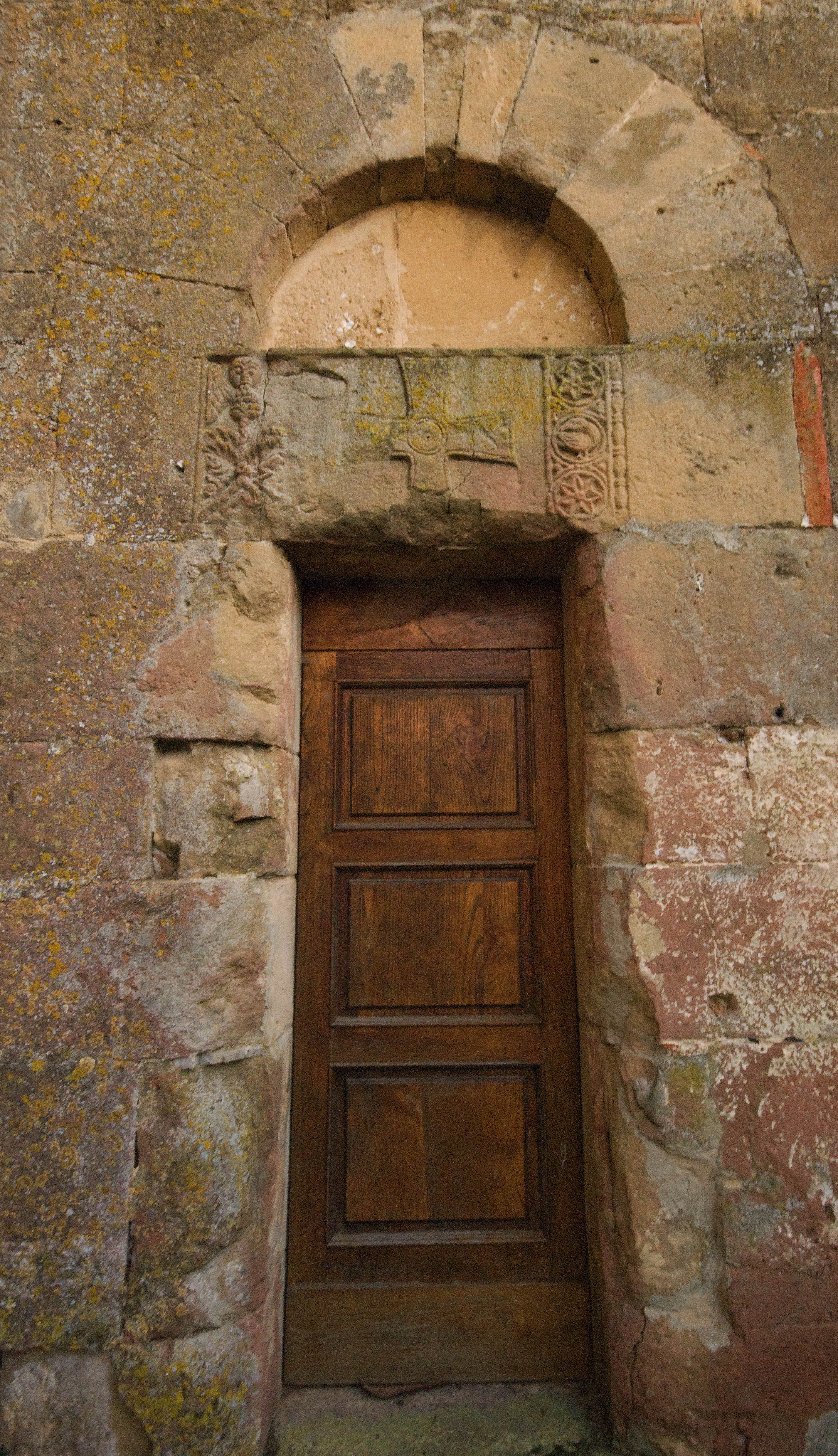 porta laterale della chiesa di san pietro a cedda (Poggibonsi)